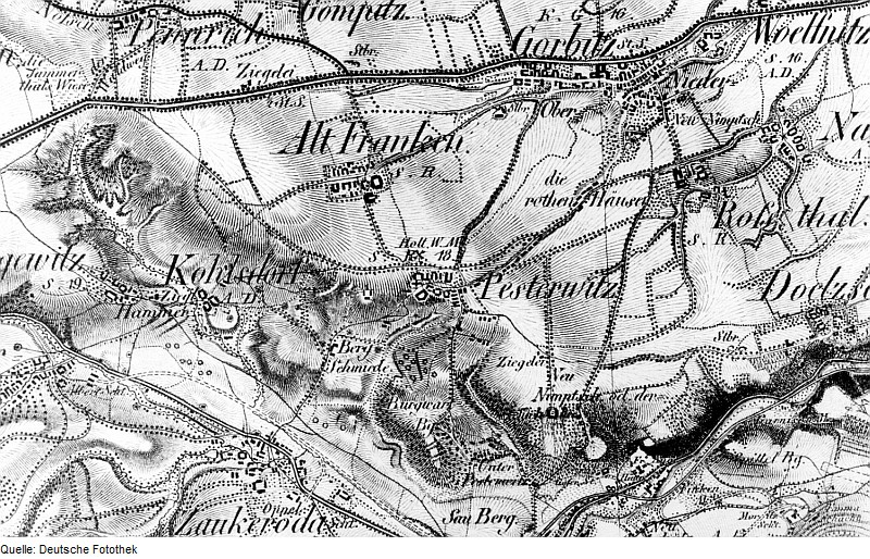 Original image description from the Deutsche Fotothek Freital-Pesterwitz. Oberreit, Sect. Dresden, 1821/22